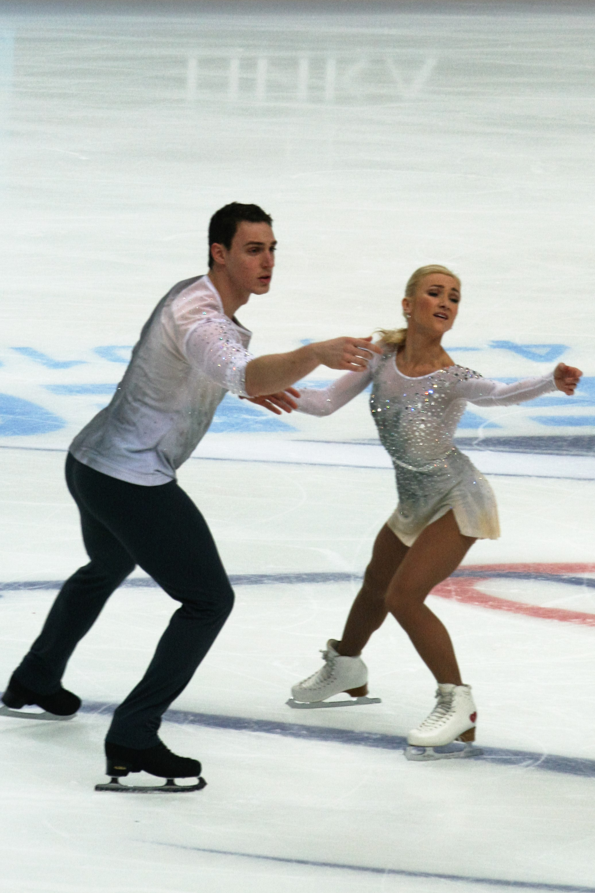 Алёна Савченко / Бруно Массо (Германия) на Кубке Ростелекома 2016.